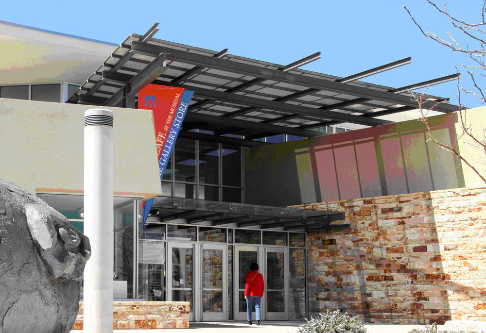 Albuquerque Museum